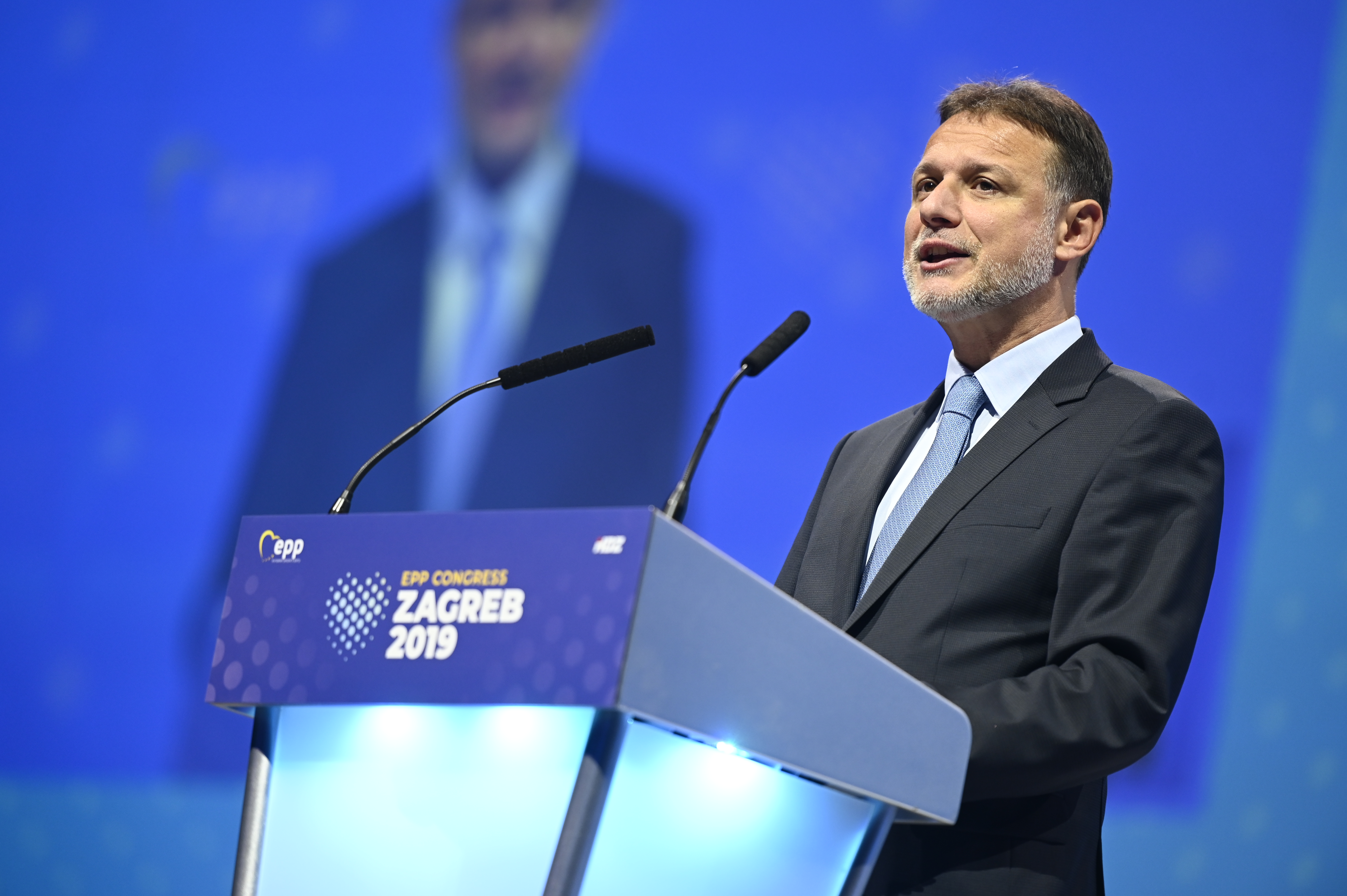 20-21 November 2019